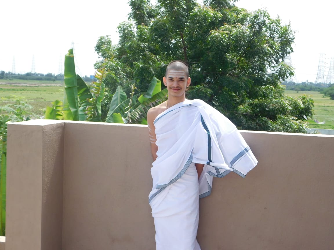 संस्कृतम्: तेनाली परीक्षाम् उत्तीर्णः प्रियव्रतपाटीलः